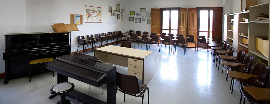 Aula del Conservatorio Superior de Música Eduardo Martínez Torner. Oviedo. España